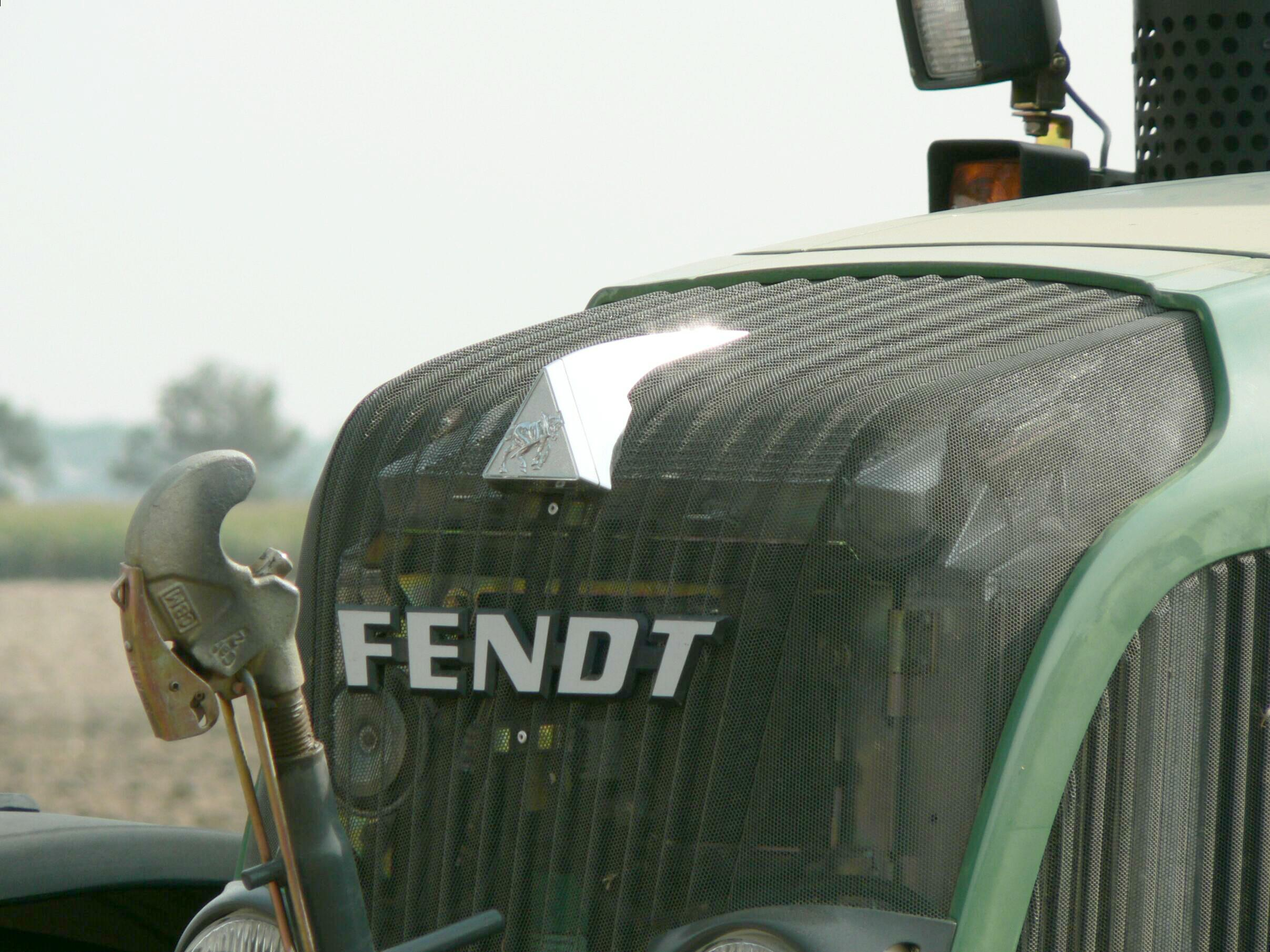 Grille Fendt 818 Vario TMS